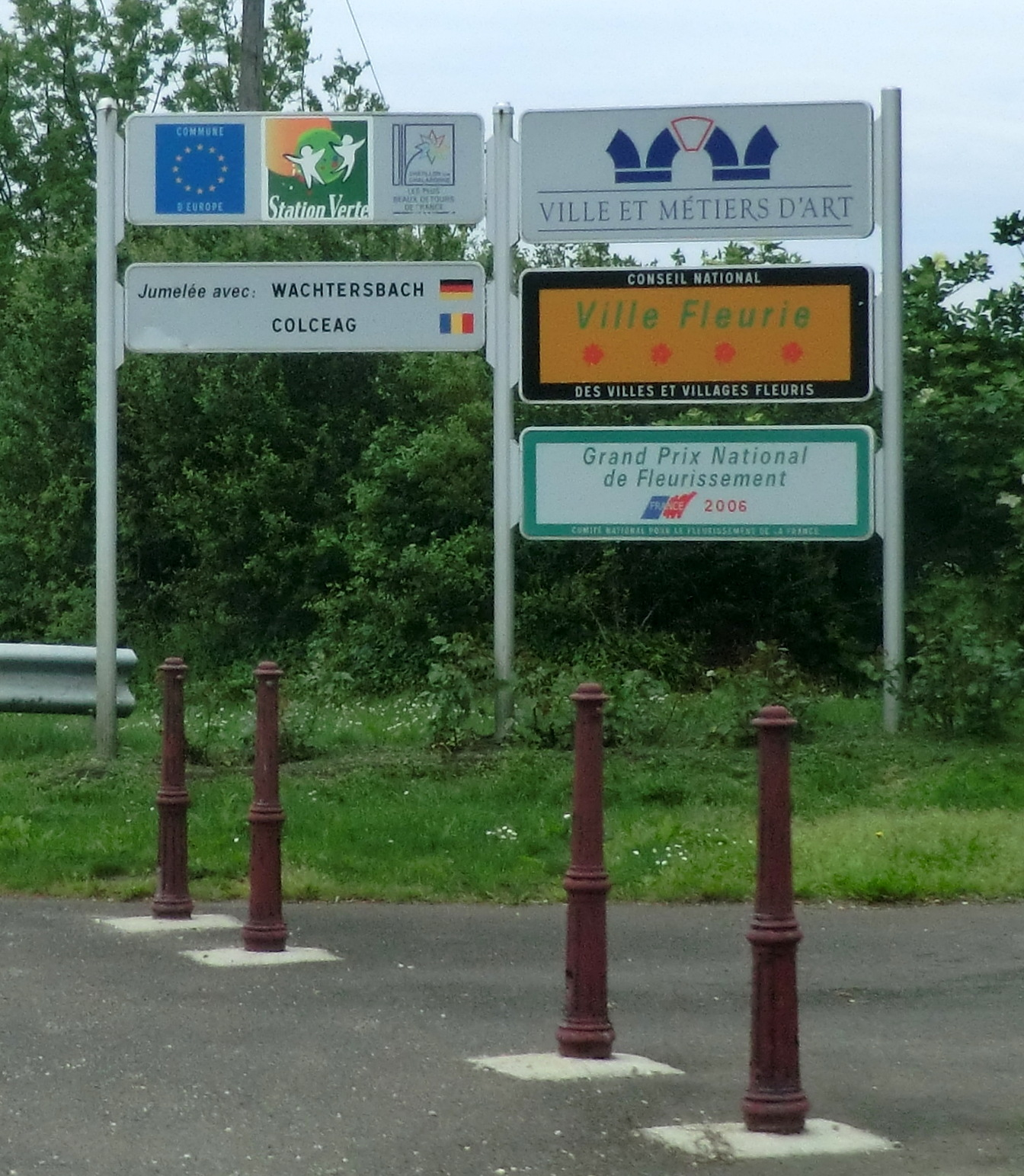 Panneau ville fleuri Châtillon-sur-Chalaronne.